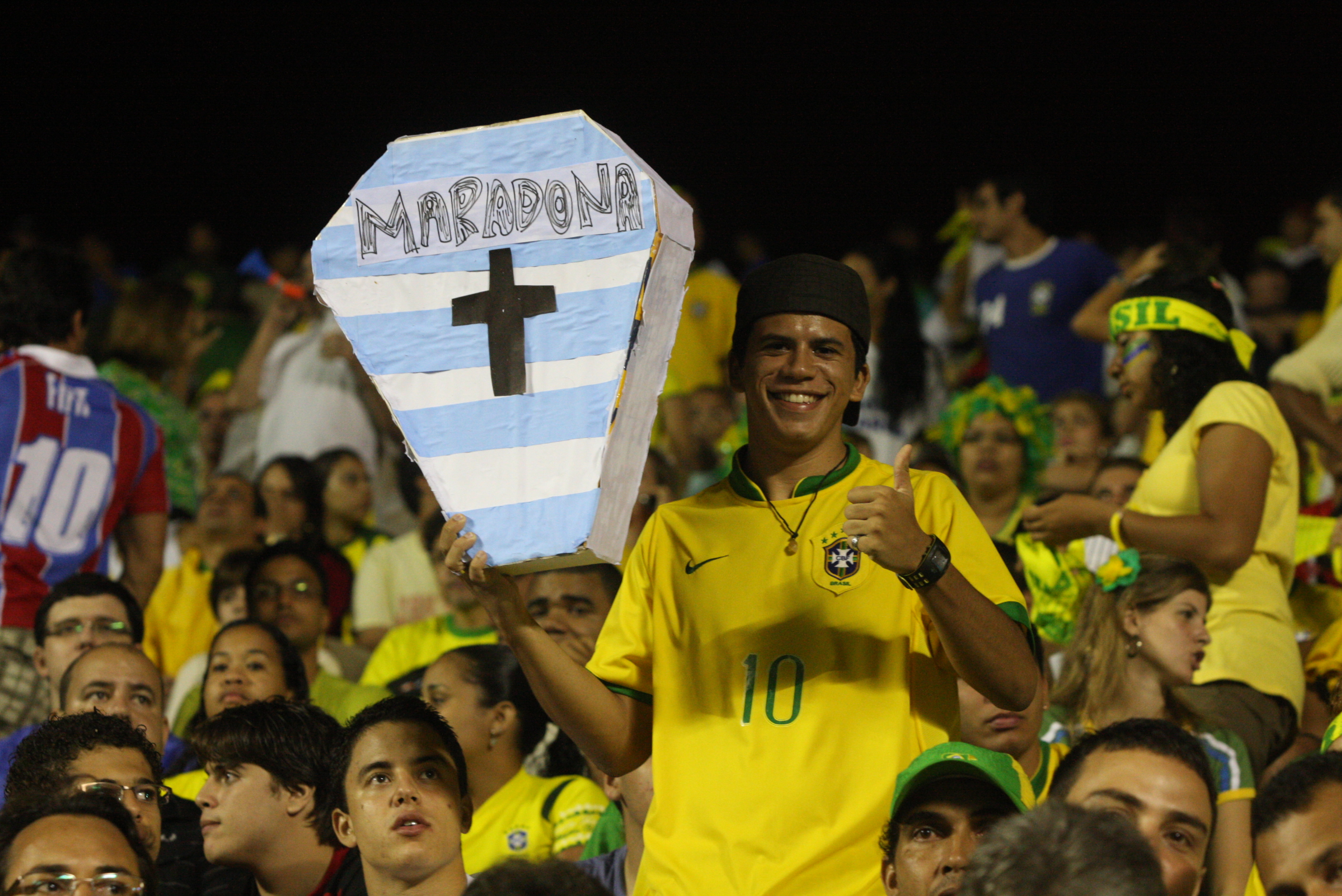 Torcedor brasileiro com caixão com cores da bandeira argentina e o nome "Maradona", representando a rivalidade entre as seleções do Brasil e da Argentina.